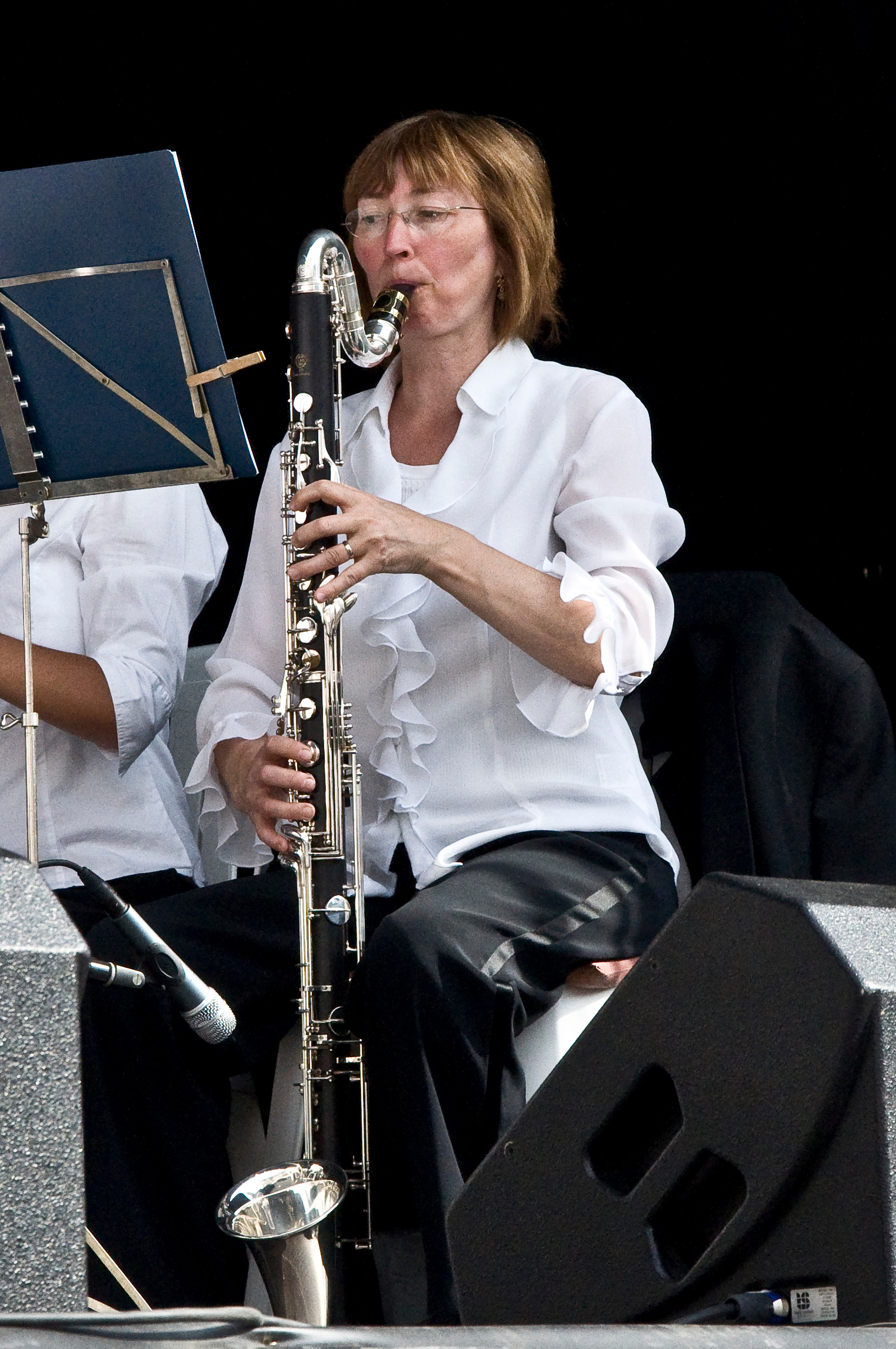 Een basklarinet